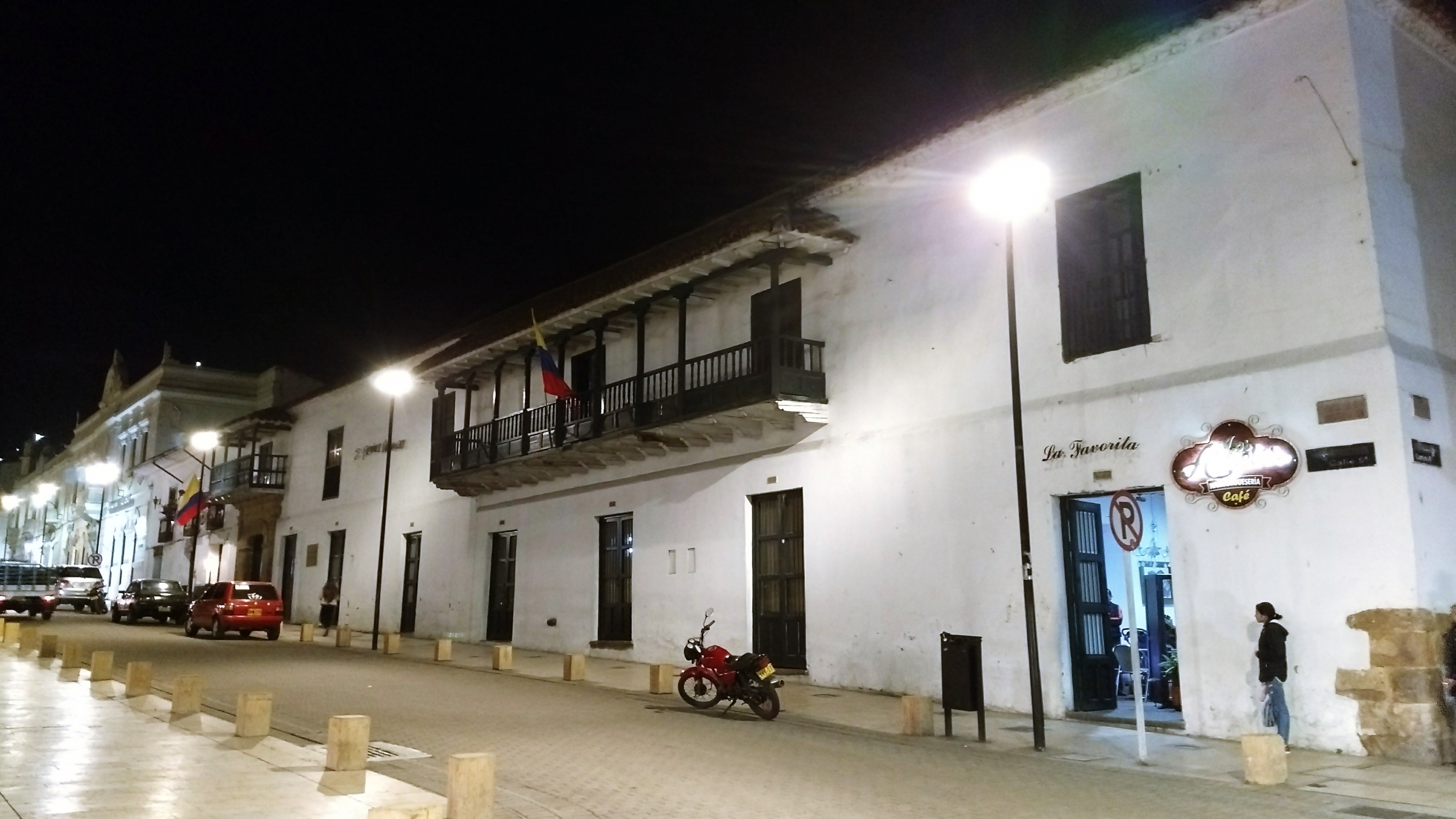 Museo de Arte Moderno Ramírez Villamizar remodelado cerca al parque de Pamplona ubicado entre carrera 6a y calle 5a